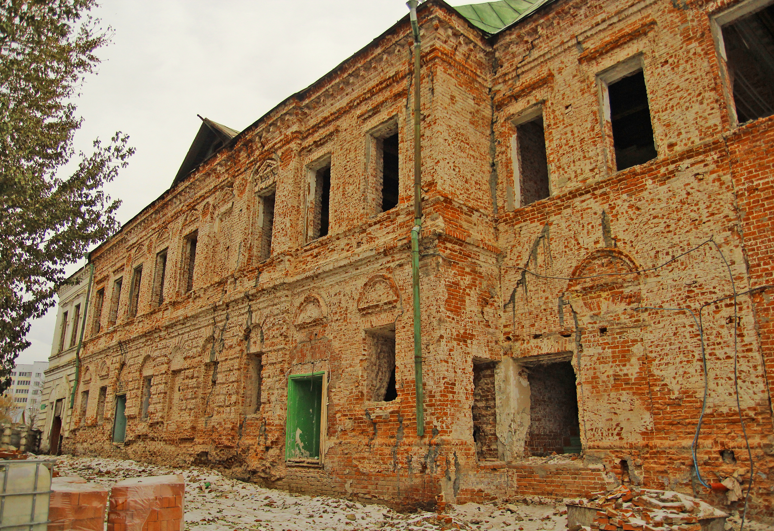 Галеевская мечеть (Республика Татарстан, Казань, тукаевская улица, 40)